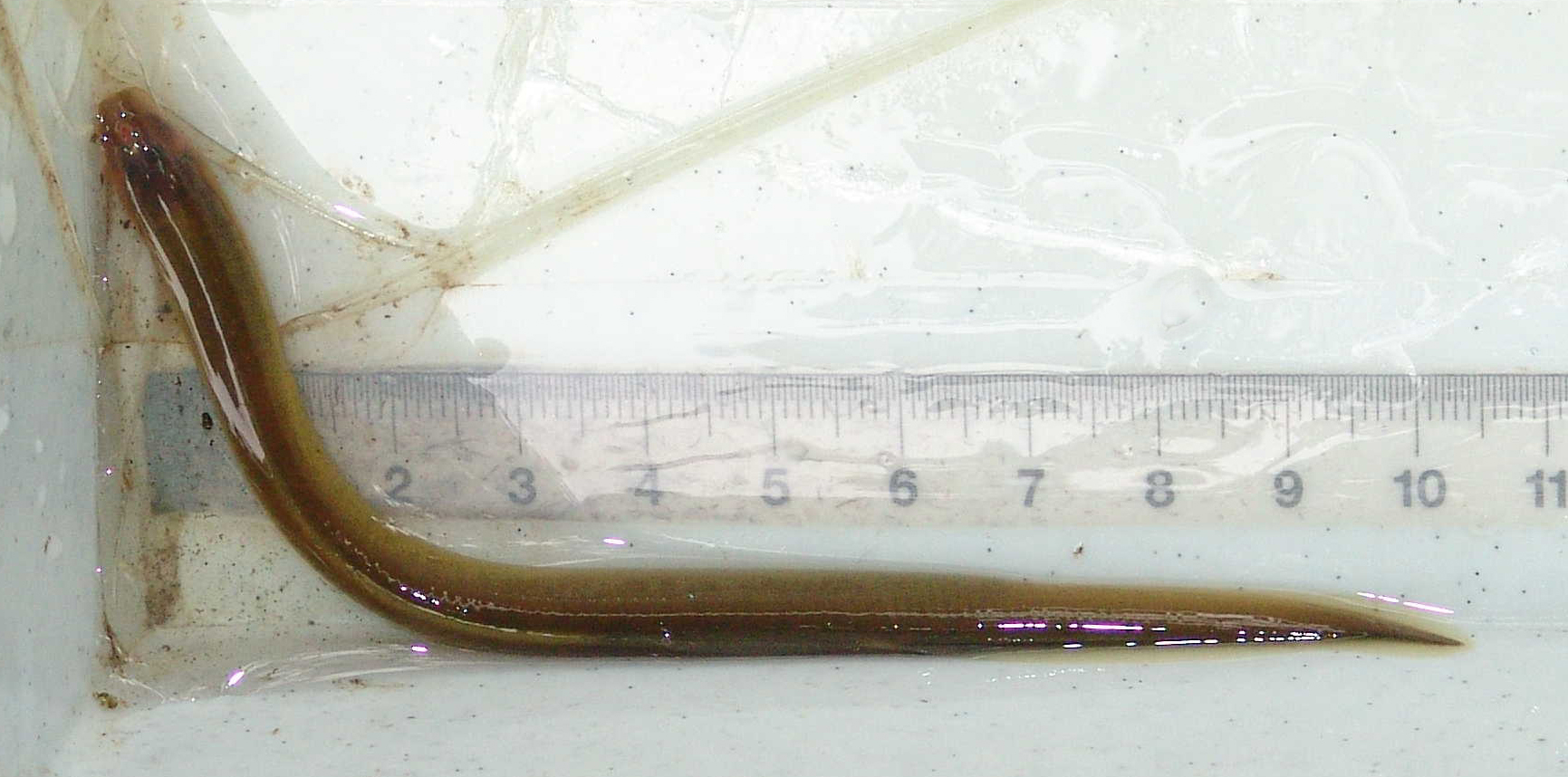 Bachneunaugenlarve aus der Spree bei Friedersdorf